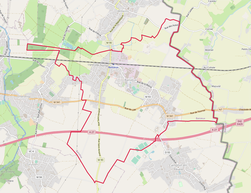 carte réalisée sur umap This map may be incomplete, and may contain errors. Don't rely solely on it for navigation.